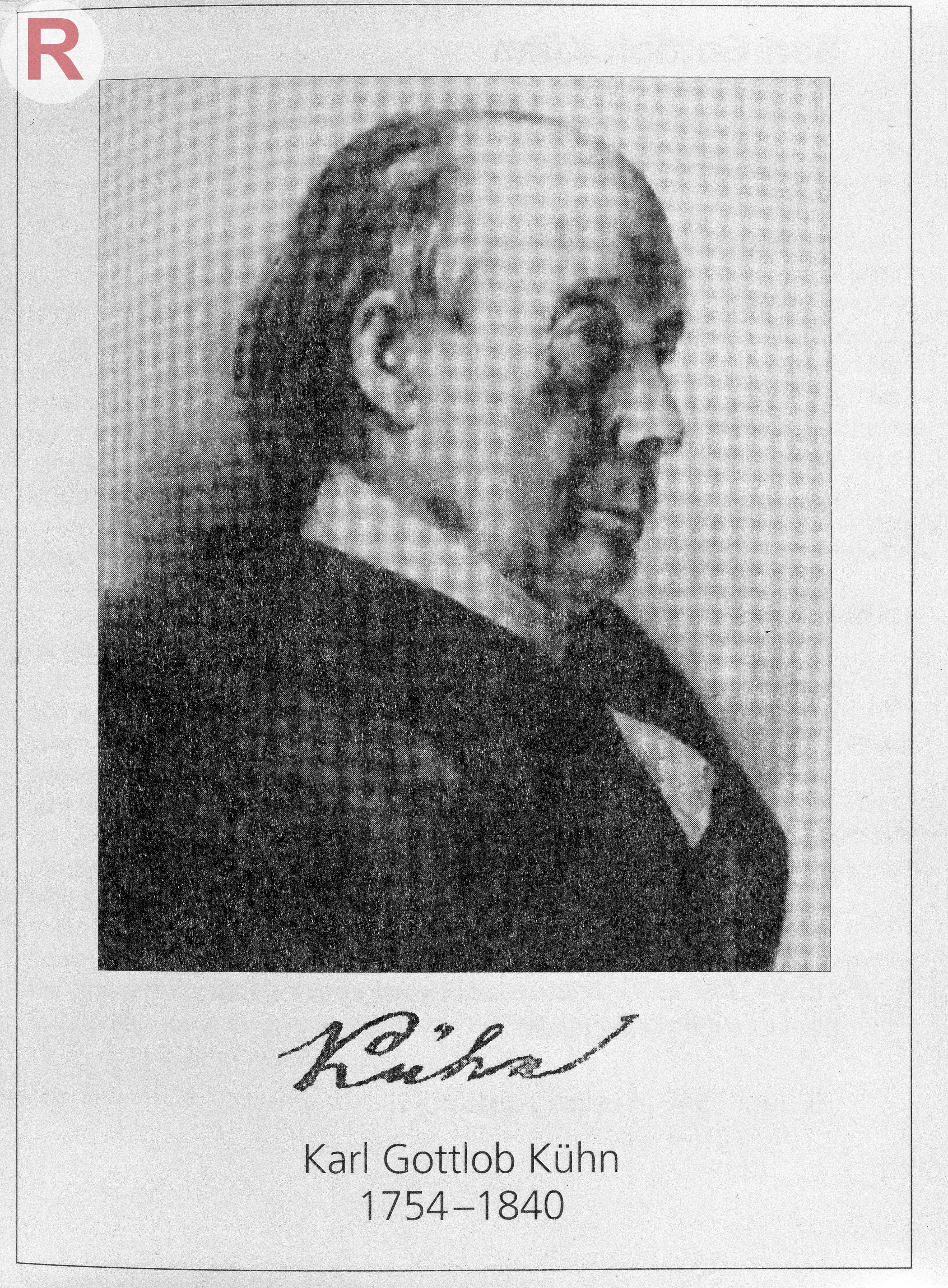 Cornelia Becker, Arzte der Leipziger Medizinischen Fakultat. Leipziger Universitatsverlag, 1995. Portrait of Karl Gottlob Kuhn, 1754-1840 page 23. Wellcome Images Keywords: PORTRAIT; karl gottlob kuhn; Portraits